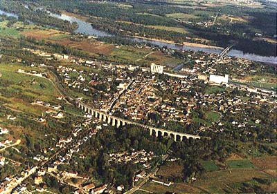 Vue aérienne de Saint-Satur (Cher, France). Photo non prise de la tour des Fiefs (tour du Moyen-âge qui domine Sancerre) qui n'est pas placée dans cet axe.